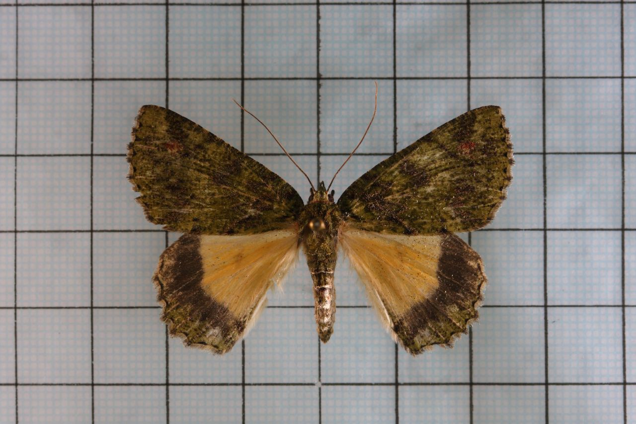 Dindica polyphaenaria (Guenee, 1857) 裏黃峰尺蛾 臺灣尺蛾科圖鑑１:P.39